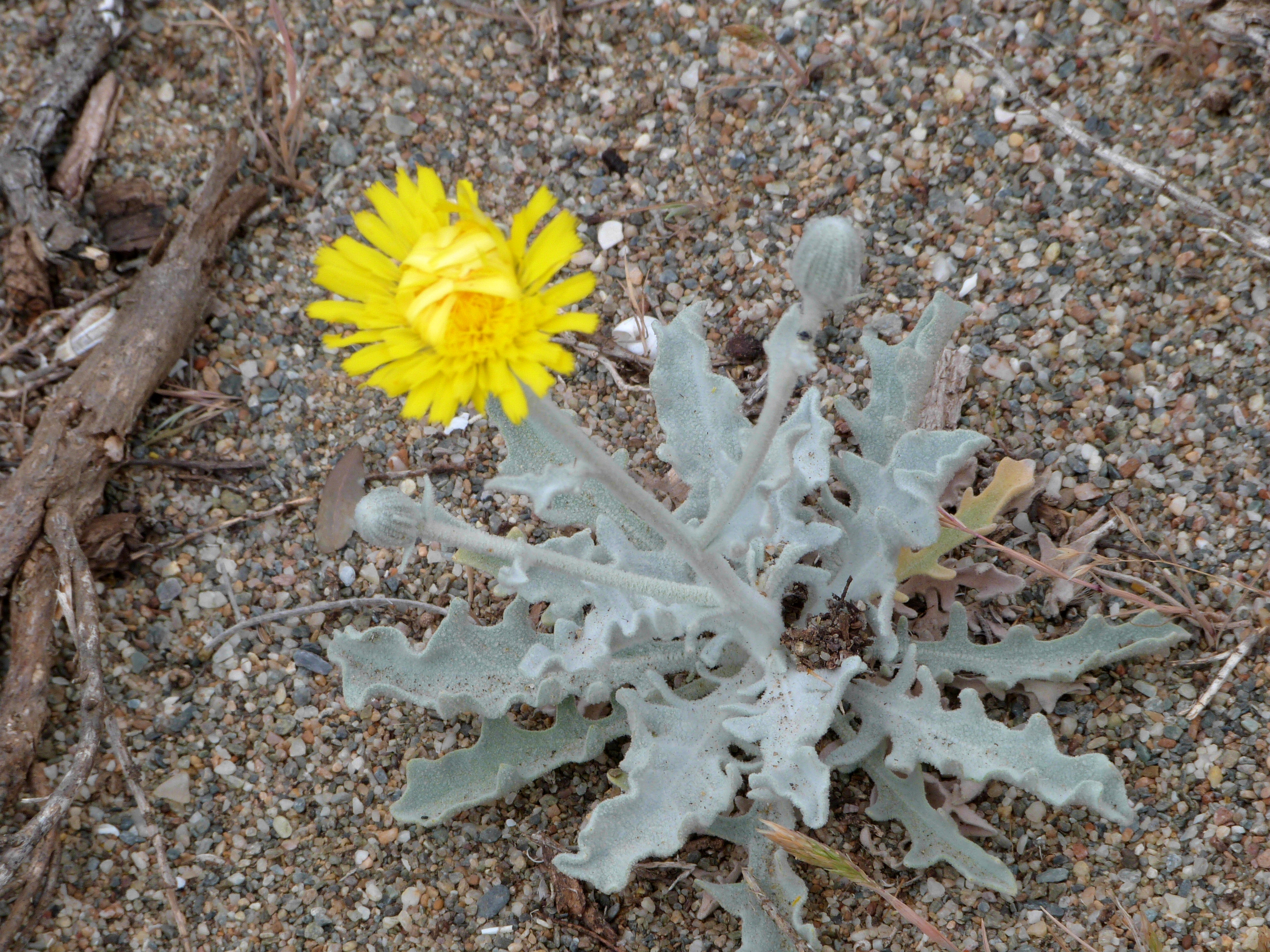 Andryala ragusina/Asteraceae